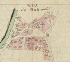 Avellanet dels Masos en el Cadastre napoleònic del 1812 (Arxius Departamentals dels Pirineus Orientals)